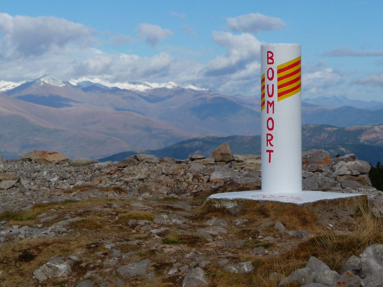 Al cim hi ha aquest pilar i un llibre de visites